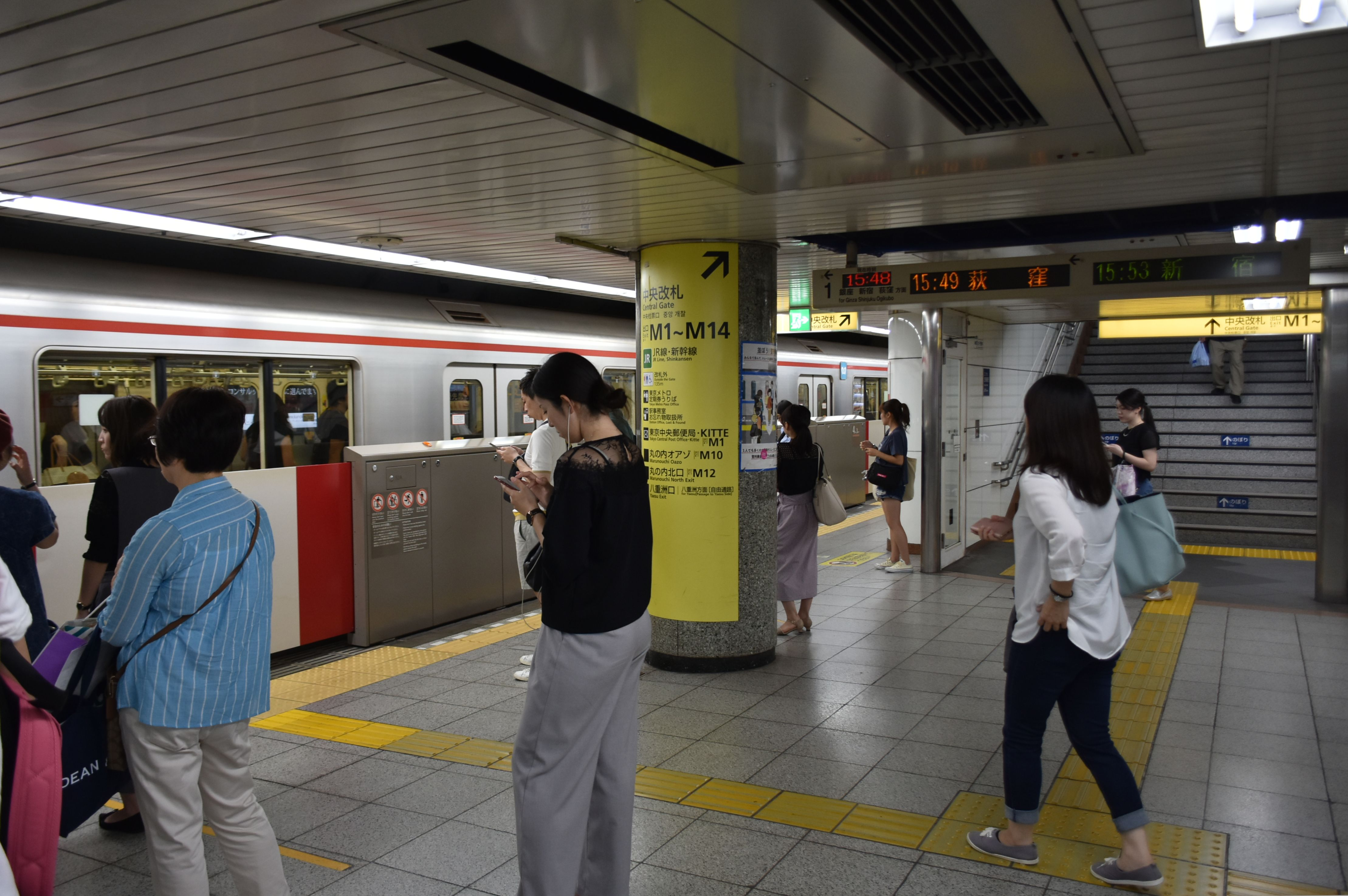 丸ノ内線 東京駅